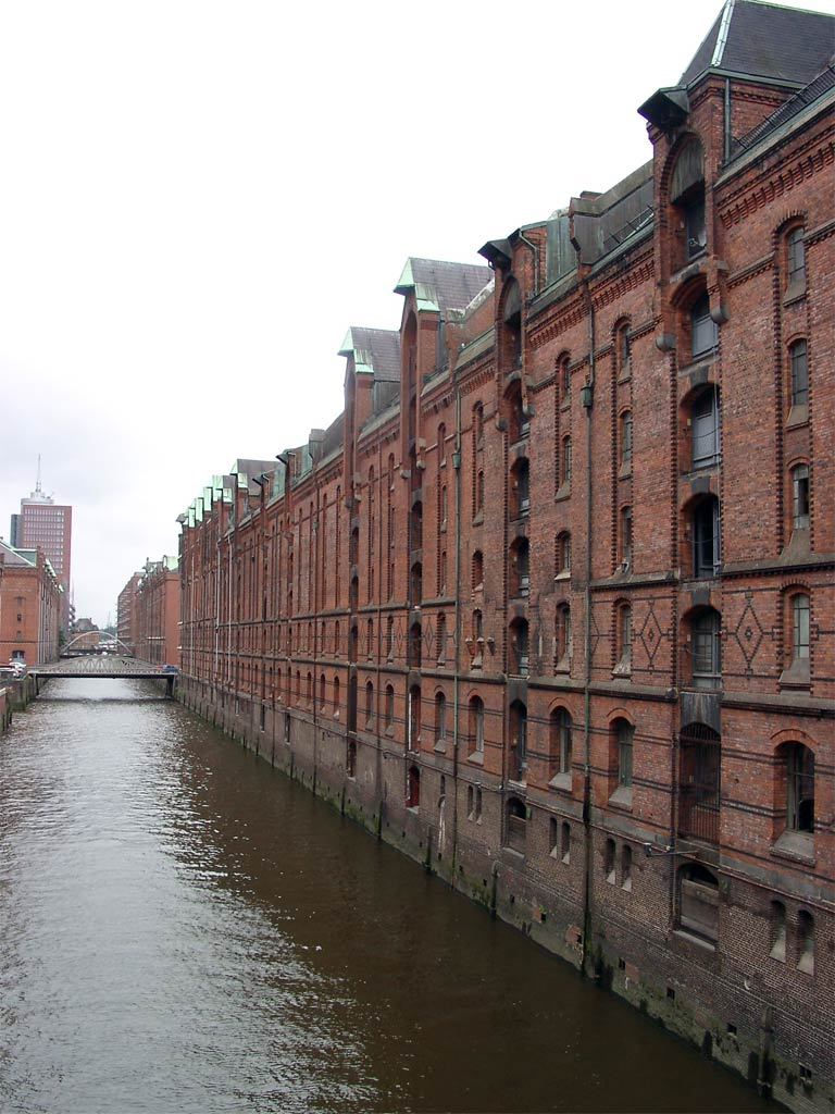 Das Brooksfleet mit Speichern in der Speicherstadt im Stadtteil Hamburg-Altstadt. This is the photograph of an architectural monument. It is part of the list of cultural monuments of Hamburg, no. 968